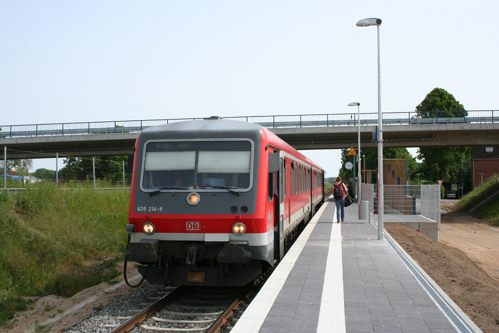 Triebwagen der Baureihe 628 am Haltepunkt Lübeck-Flughafen